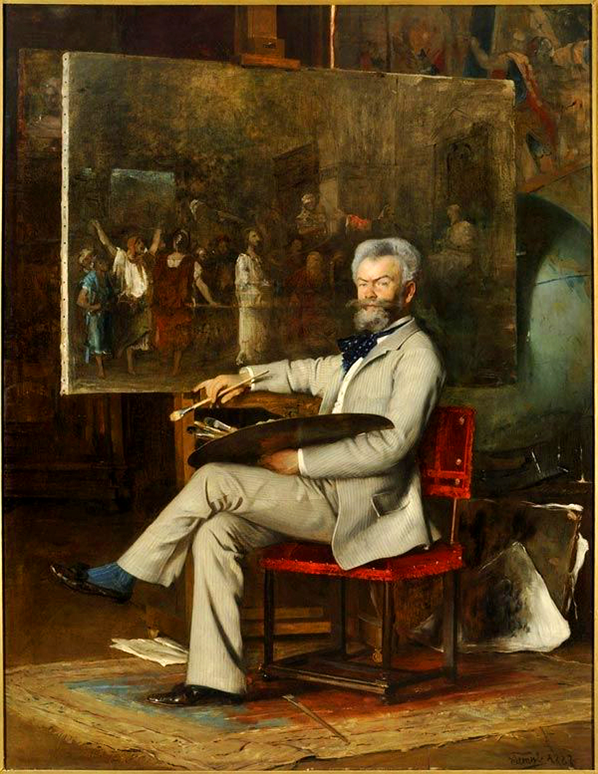 Munkácsy Mihály portréja